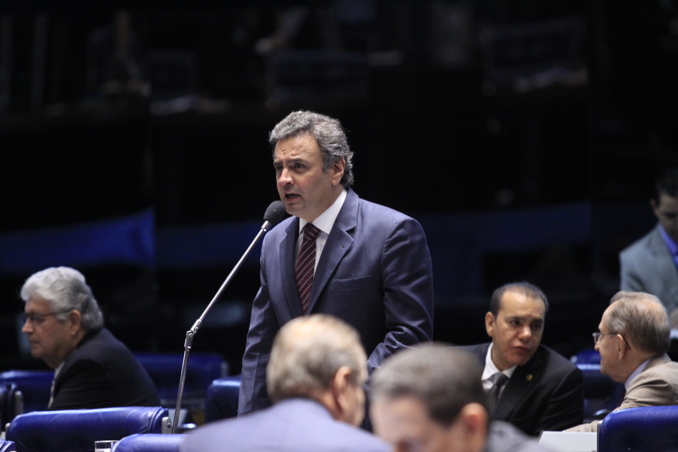 Senador Aécio Neves discursou no Senado, nesta quarta-feira (24/04), contra a proposta do governo de votar em regime de urgência projeto que inibe a criação de novos partidos.